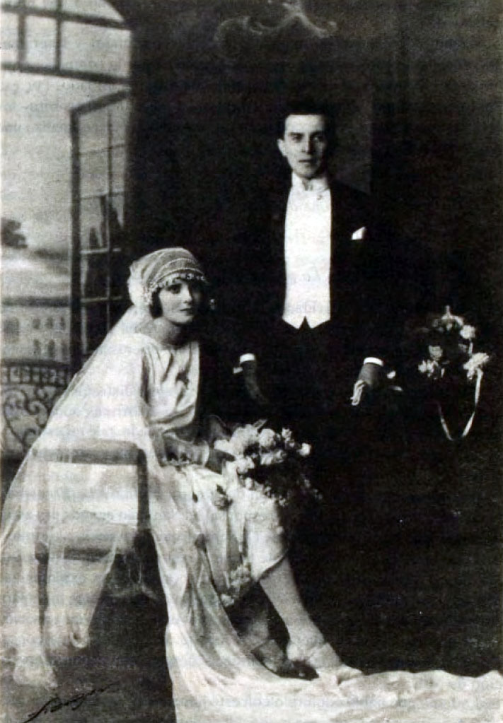 Fotografia del matrimonio de Gabriel González Videla y Rosa Markmann Reijer. Matrimonio realizado en 1920.